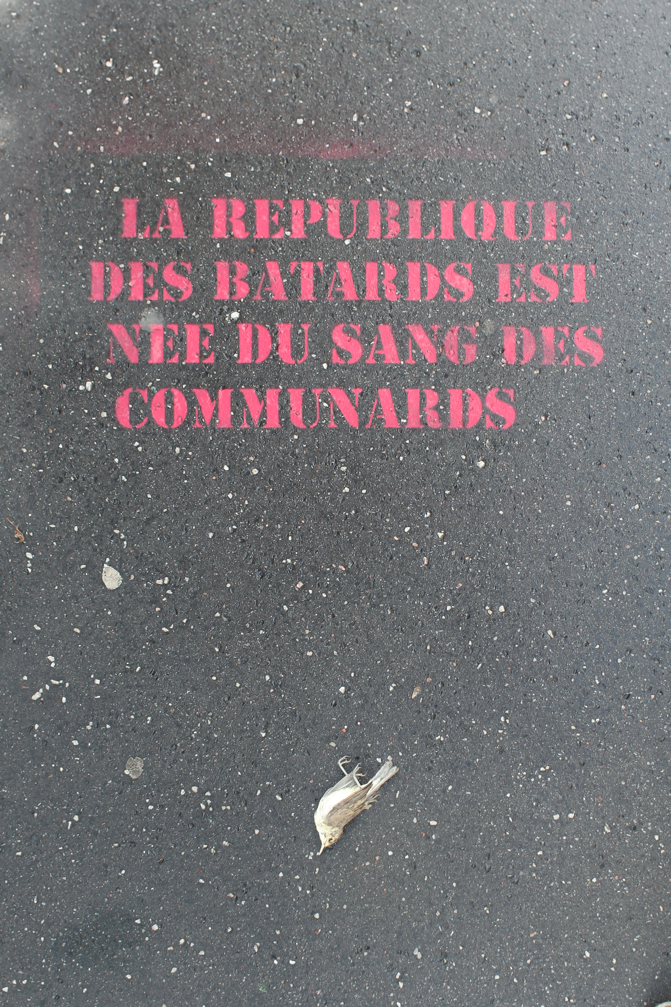 Pochoir sur le trottoir de la rue Primo-Levi, Paris.